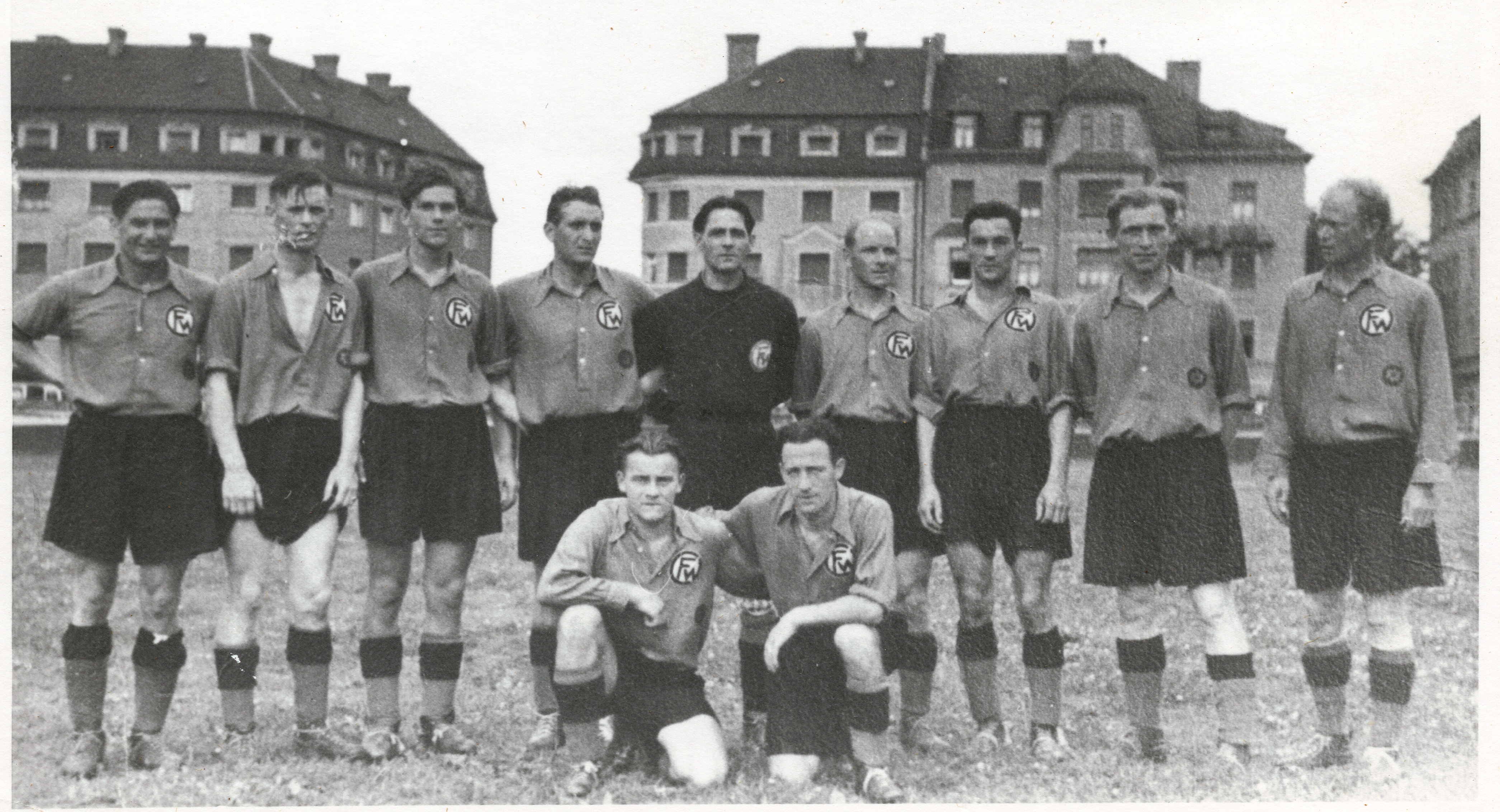 Herrenmannschaft des FC Wacker München 1939 in der NS-Zeit (Amateur-Liga Bayern)